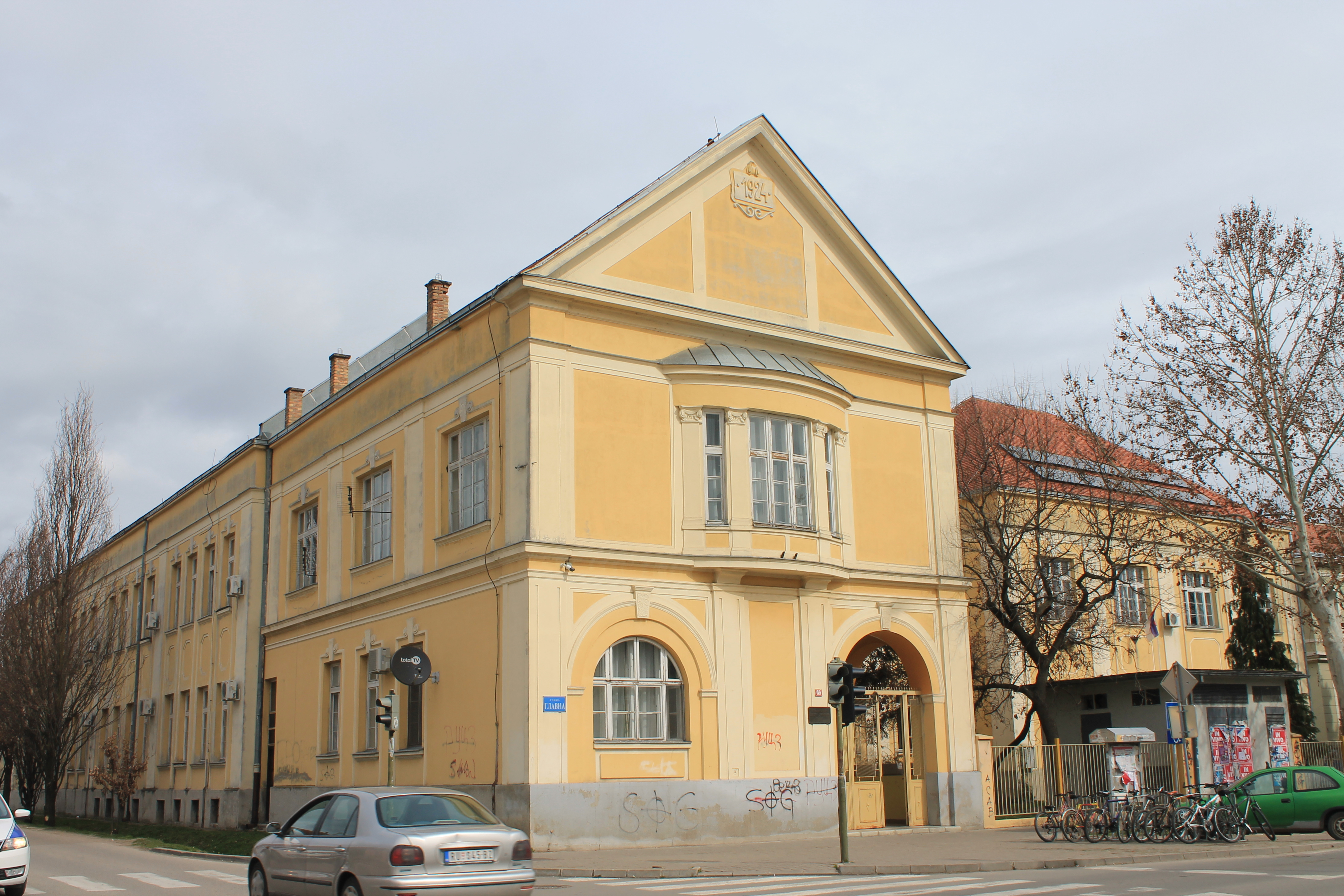 OŠ Dušan Jerković, Ruma